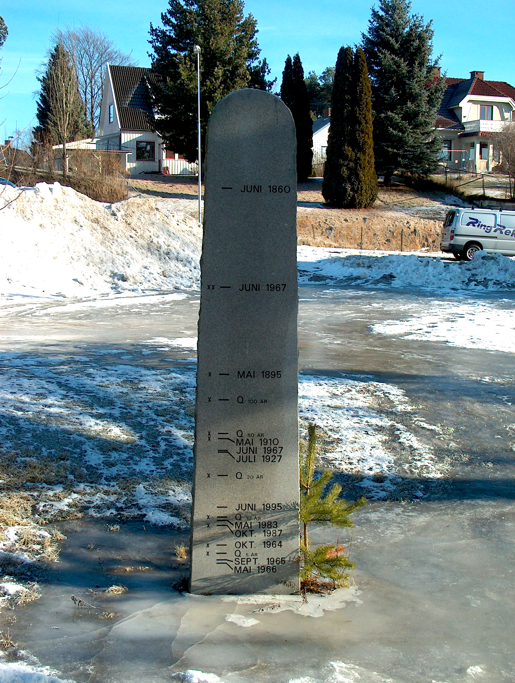 Flomsteinen ved Kvernbergsund bru (Ringerike, Norway)